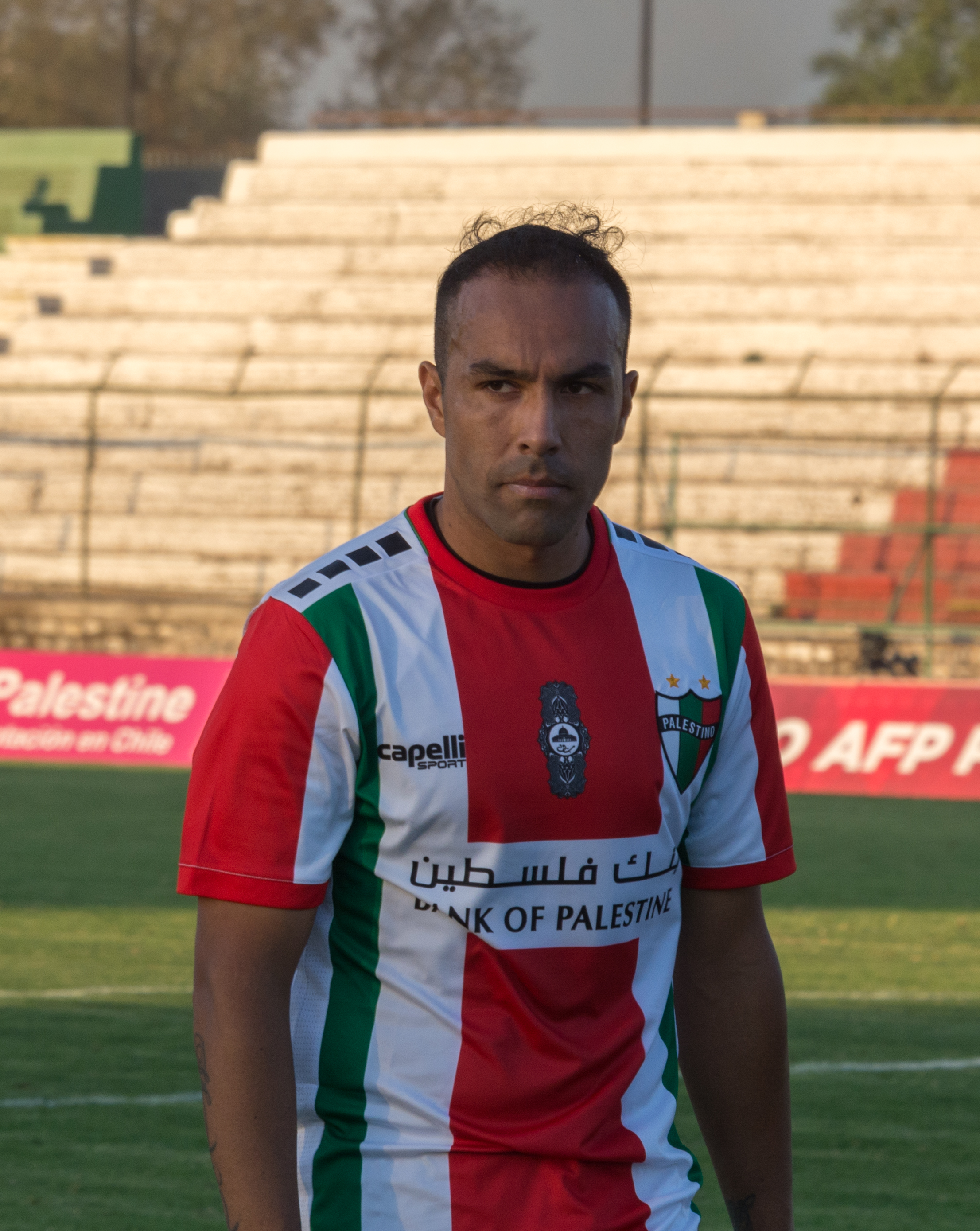 Enzo Guerrero, Palestino v O'Higgins, Estadio Municipal de La Cisterna, La Cisterna, Santiago, Chile.